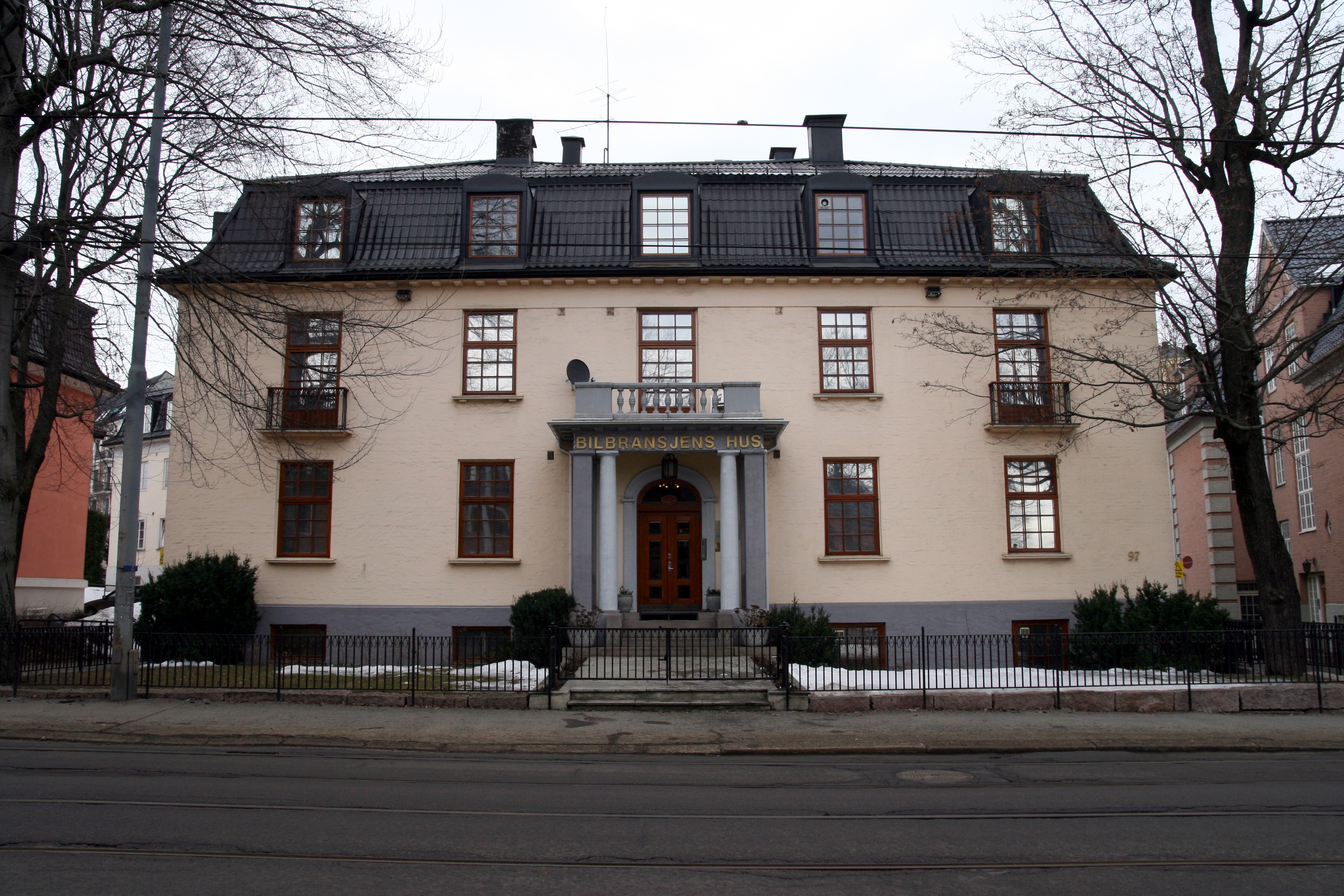 «Bilbransjens hus» i Drammensveien 97 på Skarpsno i Oslo. Her holder Norges Bilbransjeforbund til. Arkitekt: Morten Wagle (1923).